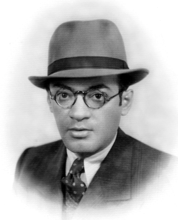 Hermes Carleial